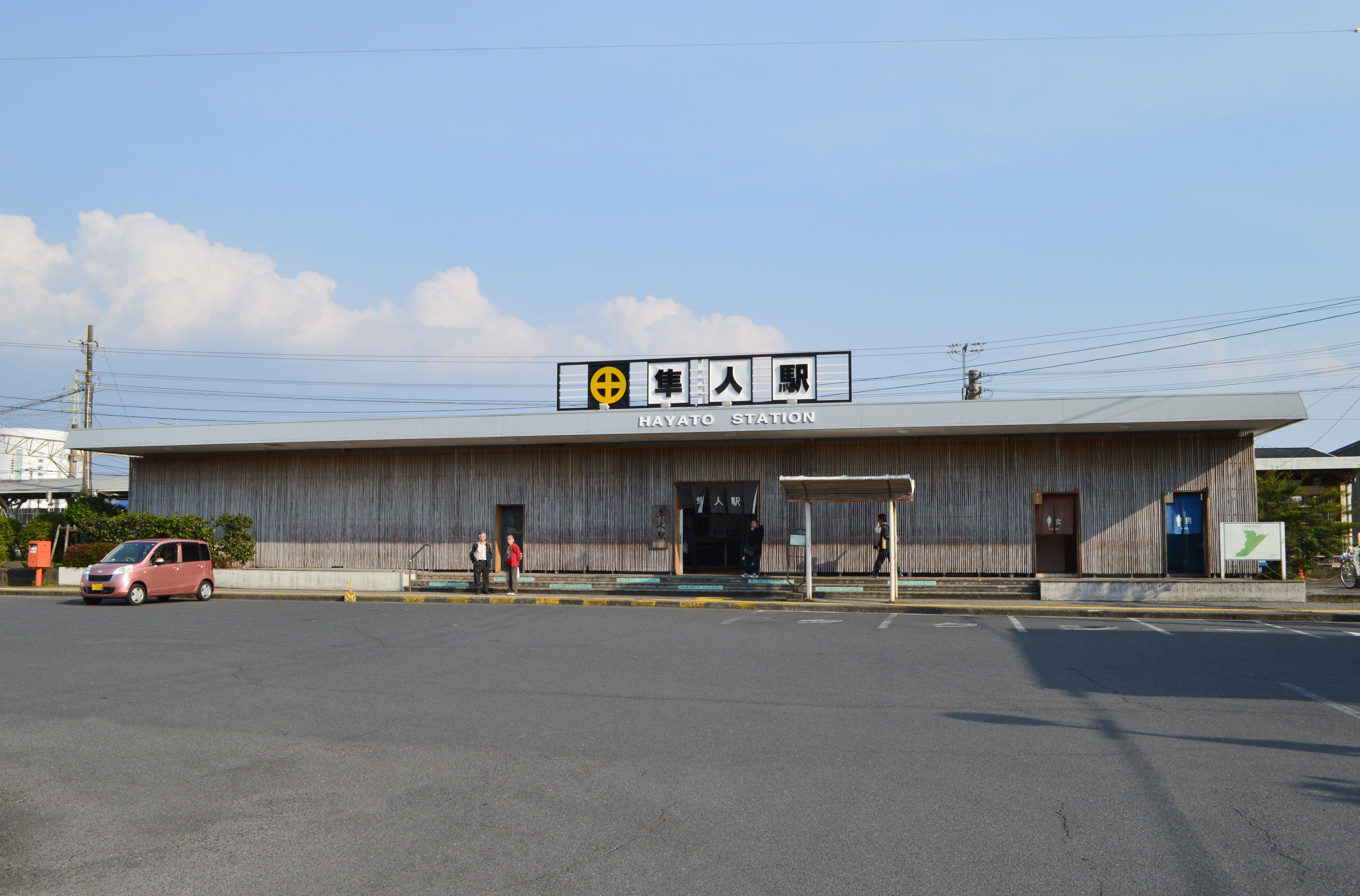 隼人駅 駅舎